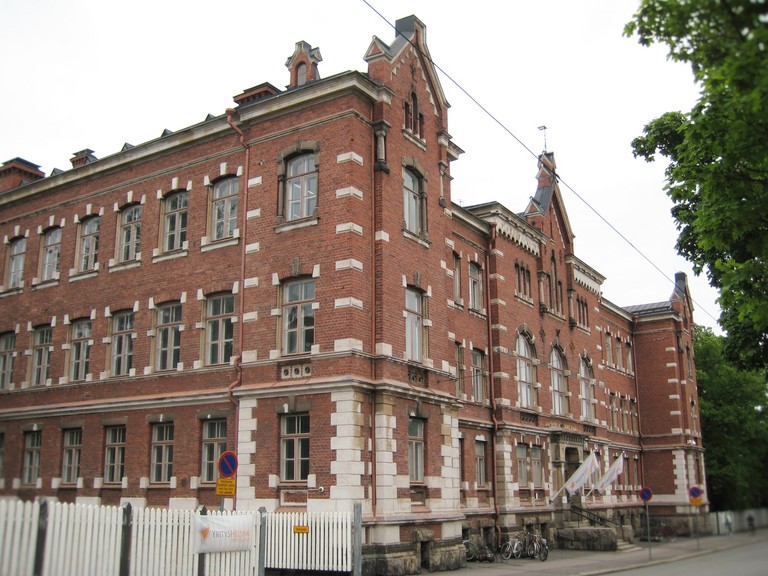 Helsingin Yrityslinna, ent. sokeainkoulu; Ensi Linja 1; Helsinki Alun perin sokeainkouluksi suunniteltu rakennus. Sisäpihan parvekkeet purettu vuonna 1974 (Aino ja Pekka Laurila). Vuodesta 2014 Helsingin kaupungin Yrityslinna. Punatiilinen, uusrenessanssin tyylinen kolmekerroksinen rakennus, jonka julkisivussa runsaasti valkoisia harkkokoristeita ikkunoiden ympärillä sekä nurkkapilastereissa.